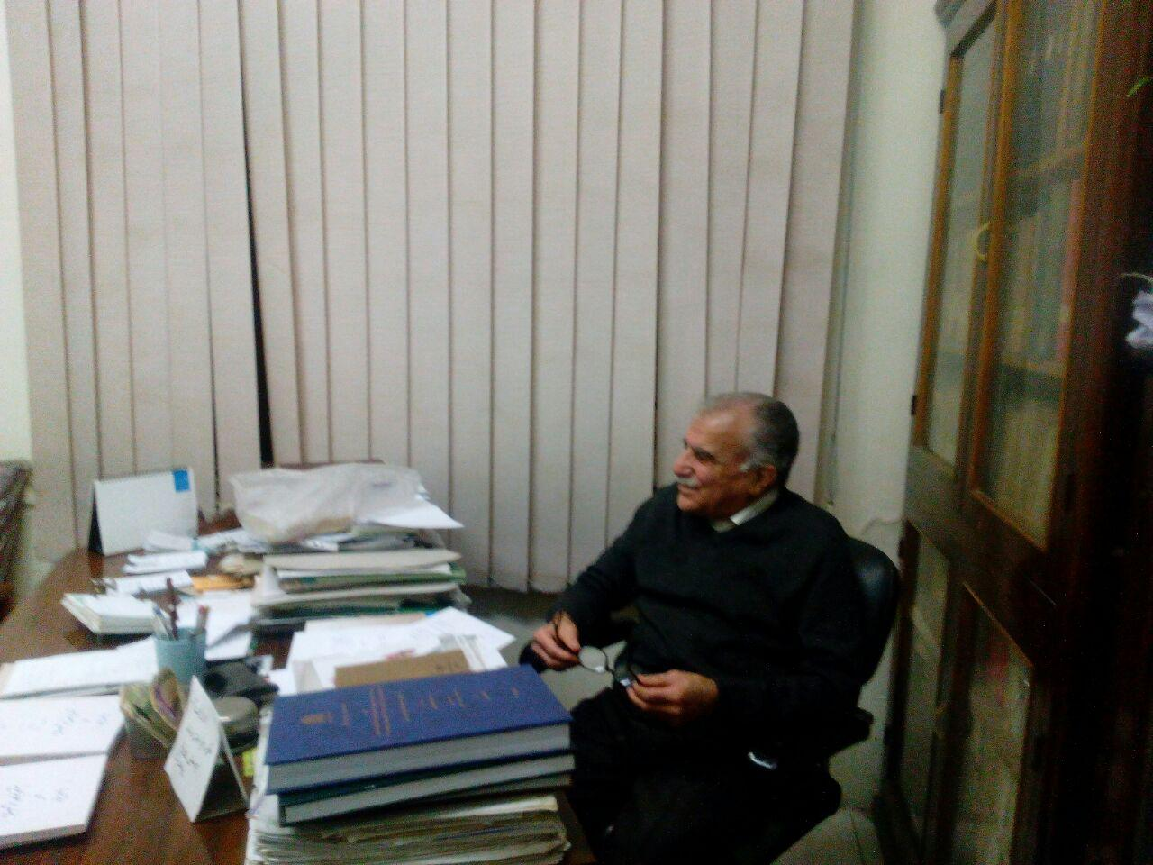 دکتر سعيد نجفي اسداللهي